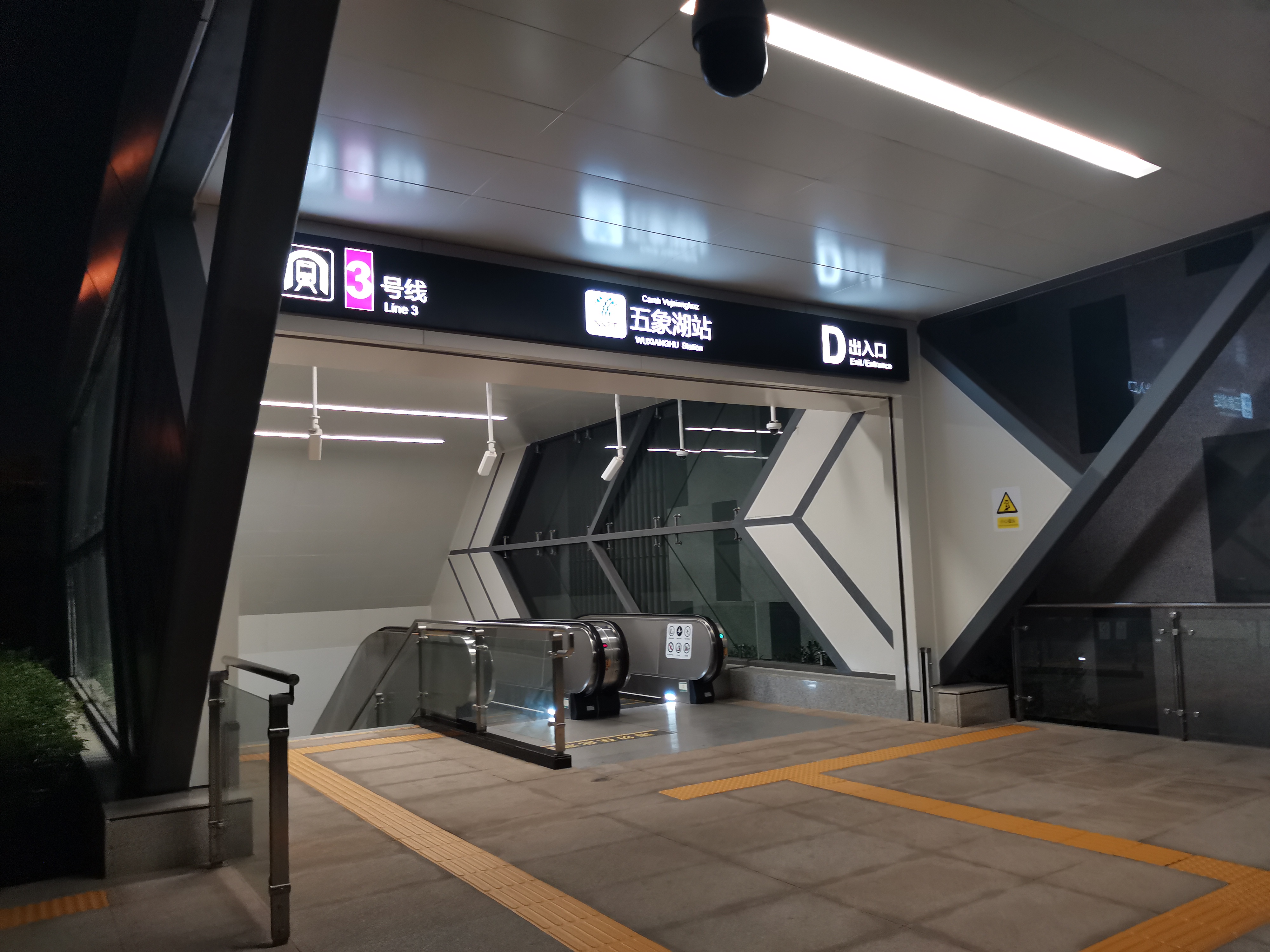 南宁轨道交通五象湖站D出口